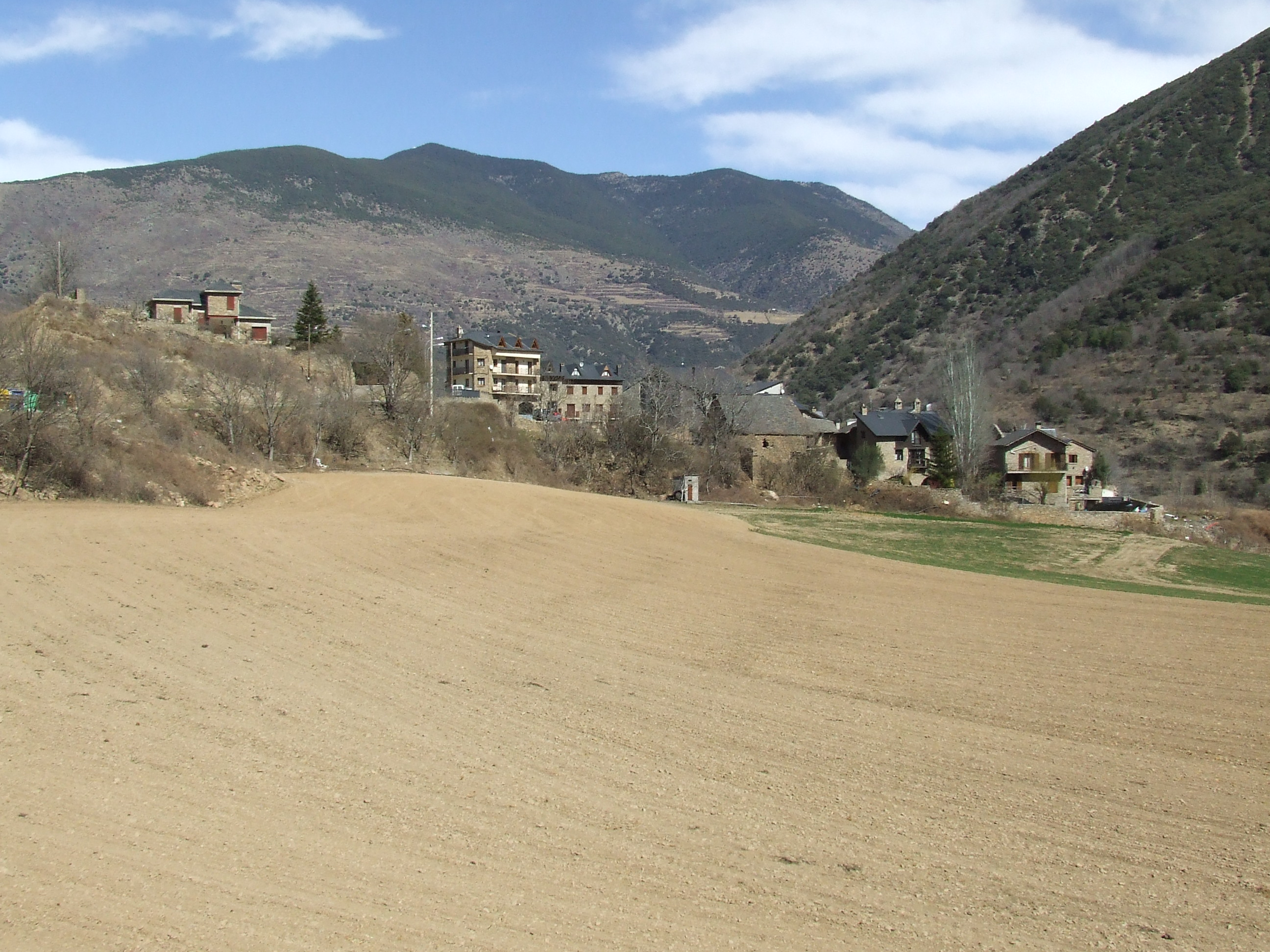 La Bastida (Sort, Pallars Sobirà)